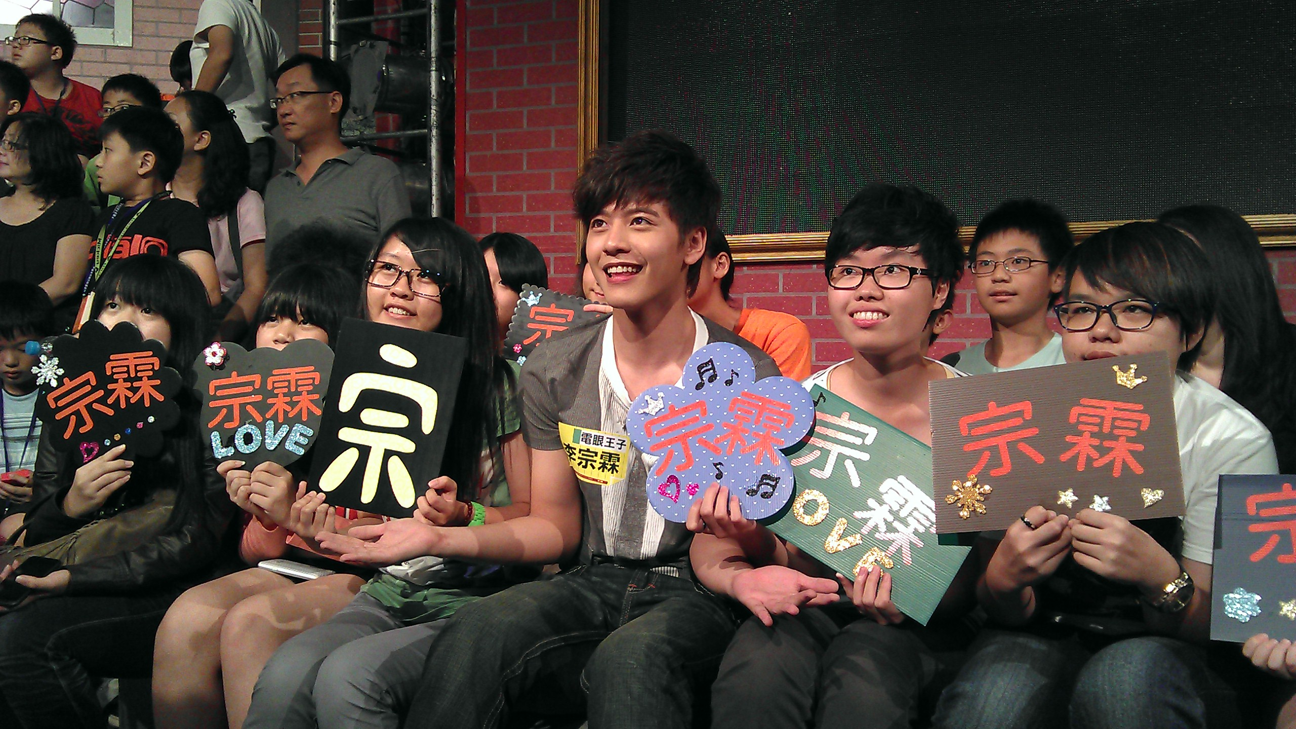 電視劇《智勝鮮師》演員李宗霖，在《百萬小學堂》宣傳電視劇，與觀眾同照。